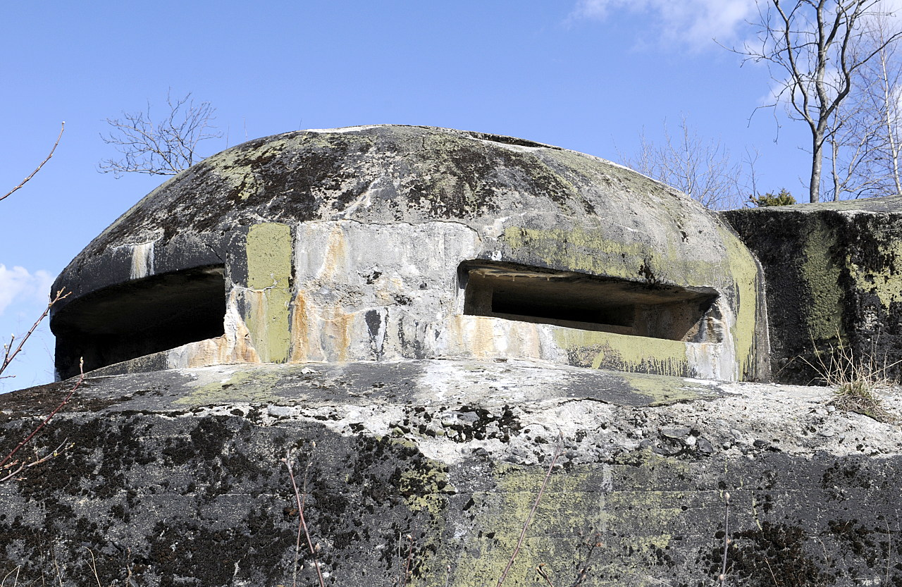 Kommandostandplass ved panserbatteri B